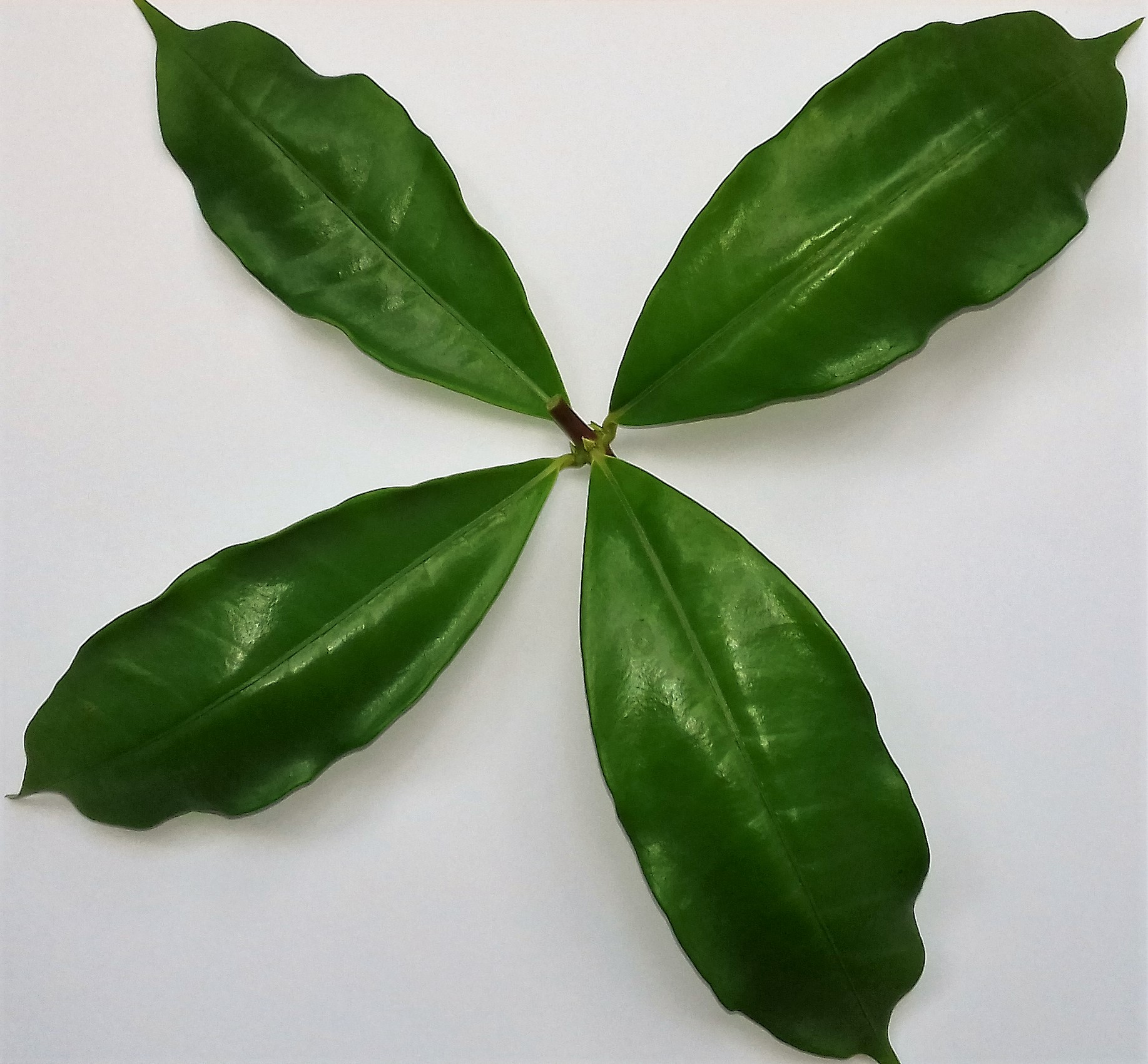 Feuilles d'Allamanda cathartica prélevées dans un quartier résidentiel de Nouméa, en Nouvelle-Calédonie. Les feuilles sont verticillées (réparties axialement autour du rameau). Sur le dessus, leur aspect est vernissé. Les feuilles sont acuminées, c'est-à-dire que leur pointe se resserre brusquement tout en se prolongeant.